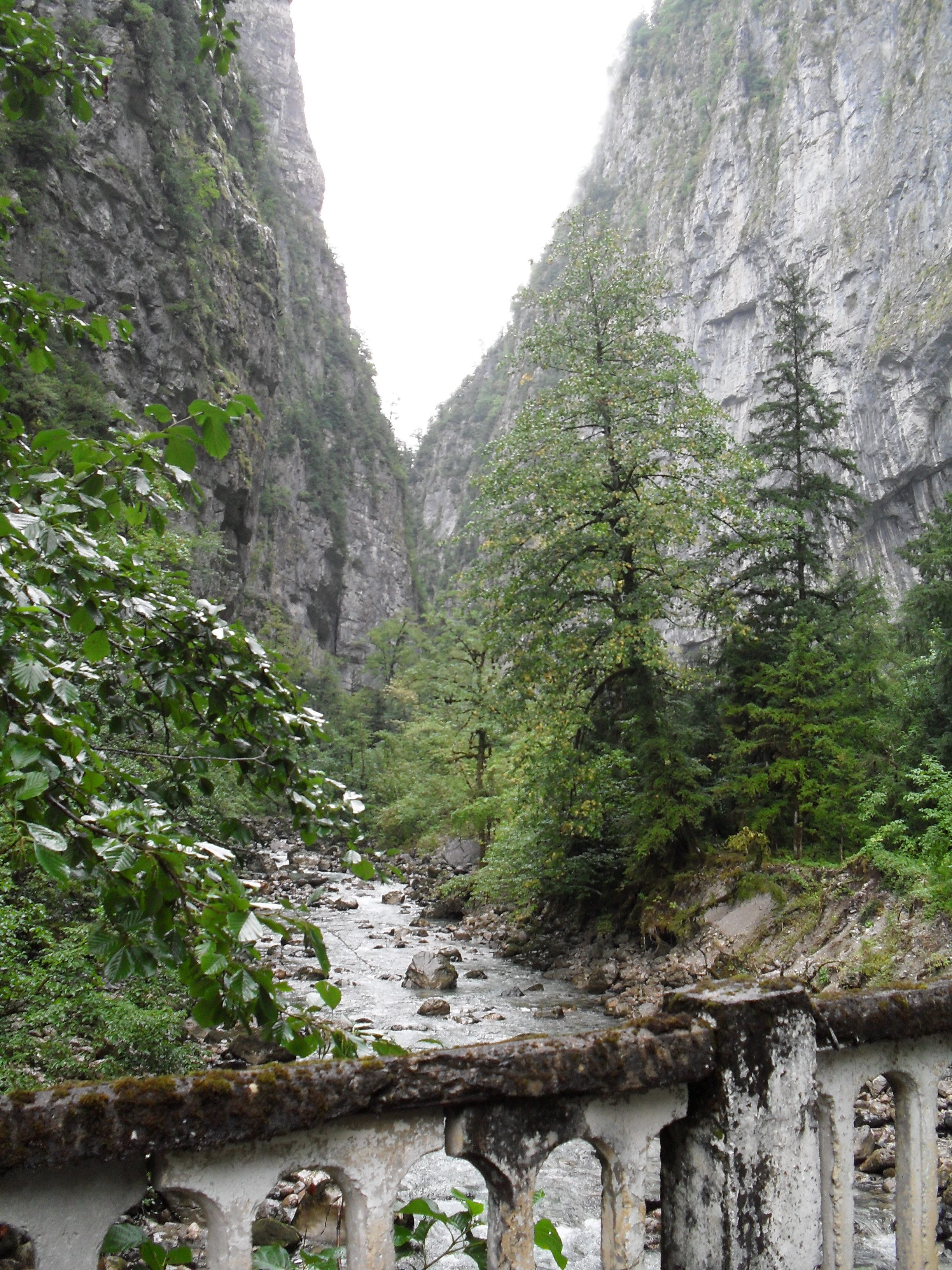 Абхазия. р.Юпшара в среднем течении